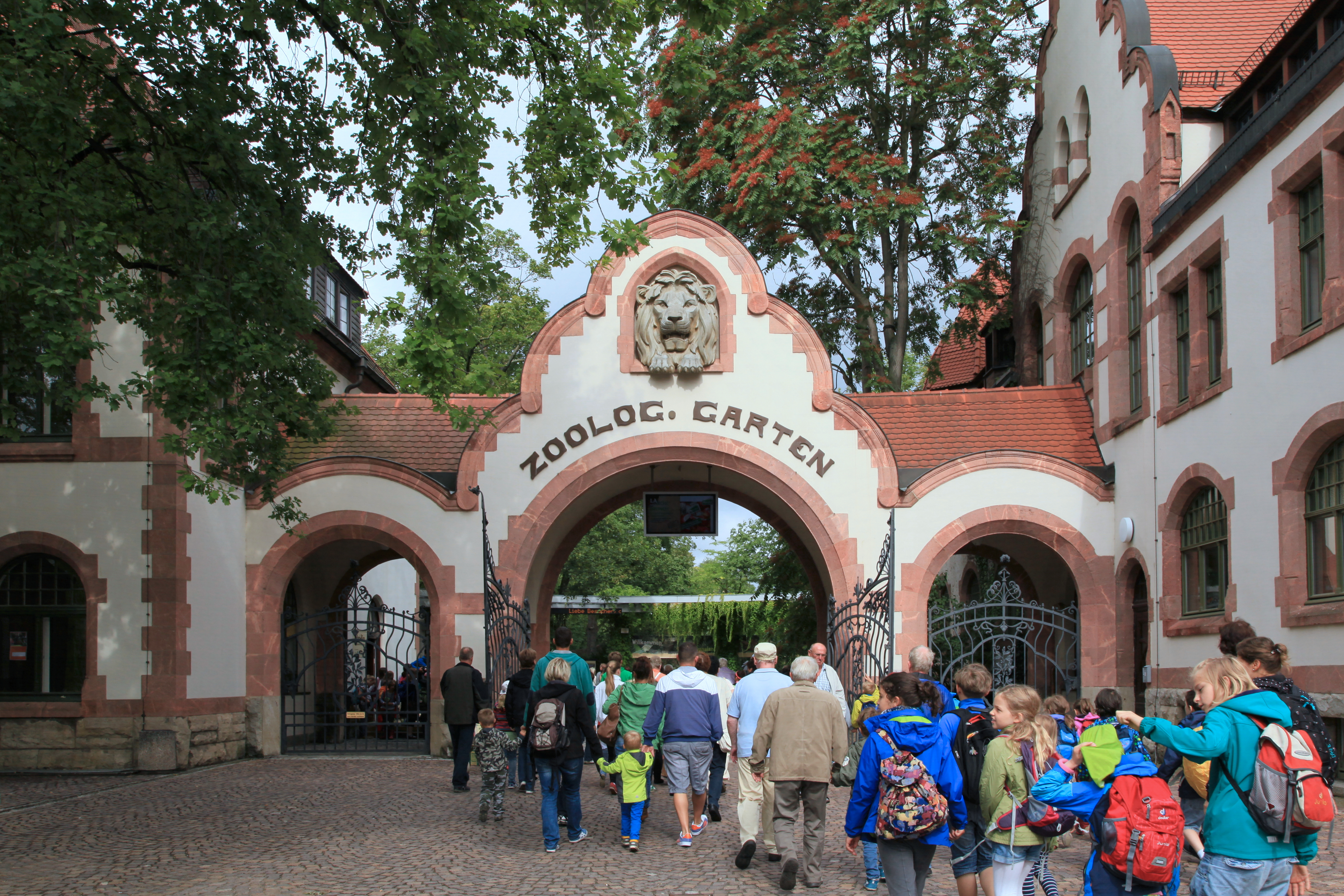 Haupteingangstor zum Zoo, Gründer-Garten im Zoo von Leipzig